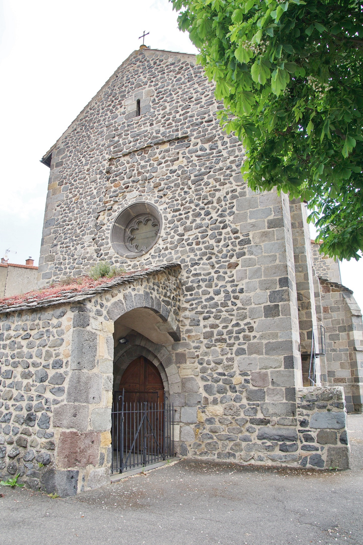 Puy de Dôme